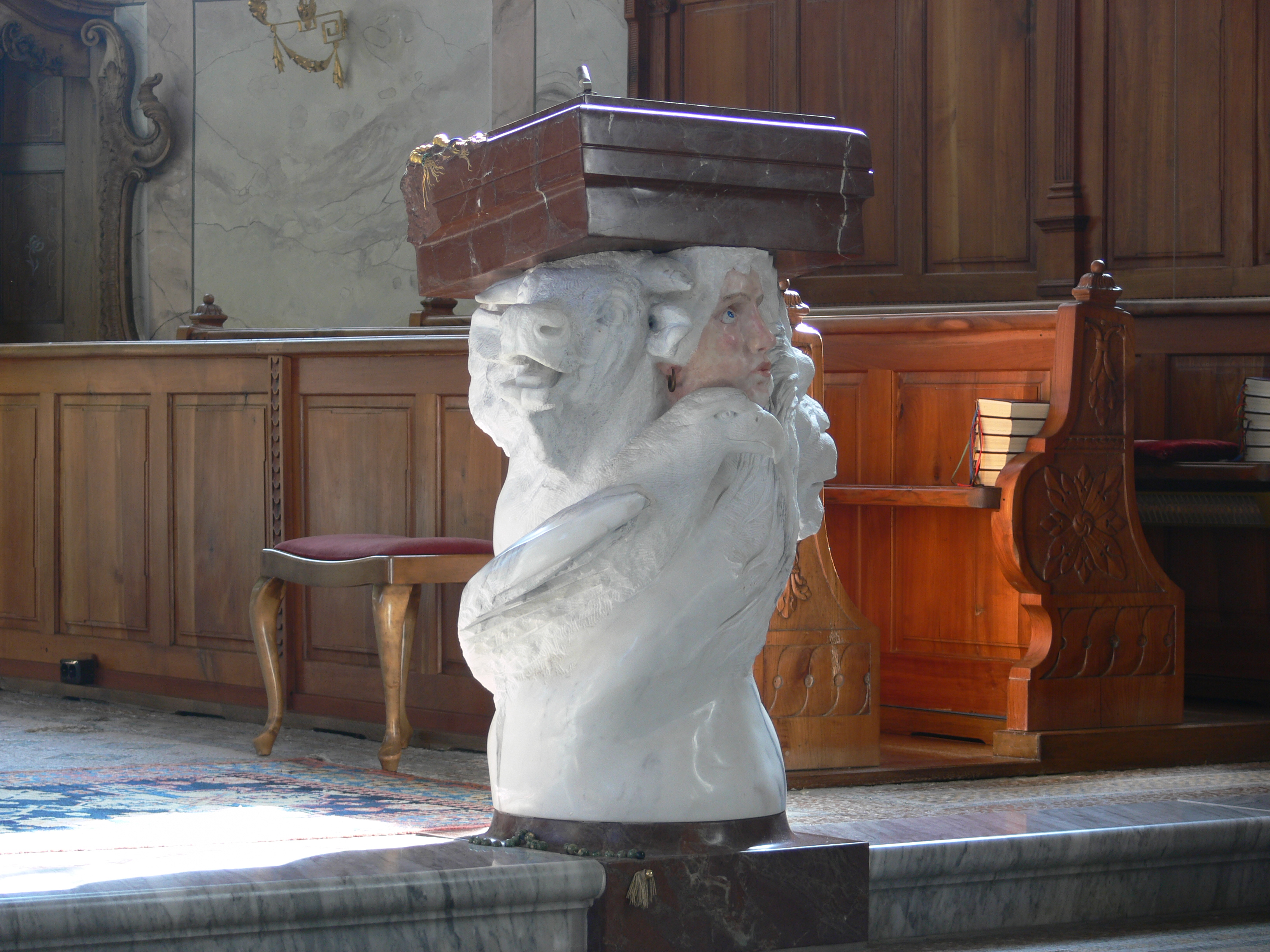 Pfarrkirche St. Gallus, Scheidegg: Blick in den Chor mit Chorgestühl (Hintergrund) und Ambo (Vordergrund, verziert mit Evangelistensymbolen)